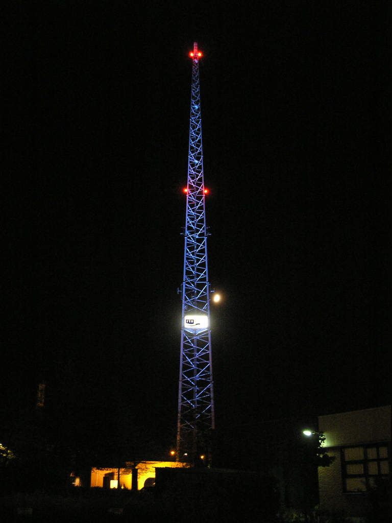 Nachtfoto van zendmast van RTV Oost te Hengelo (Overijssel). Gebouwd 2003, 125m.